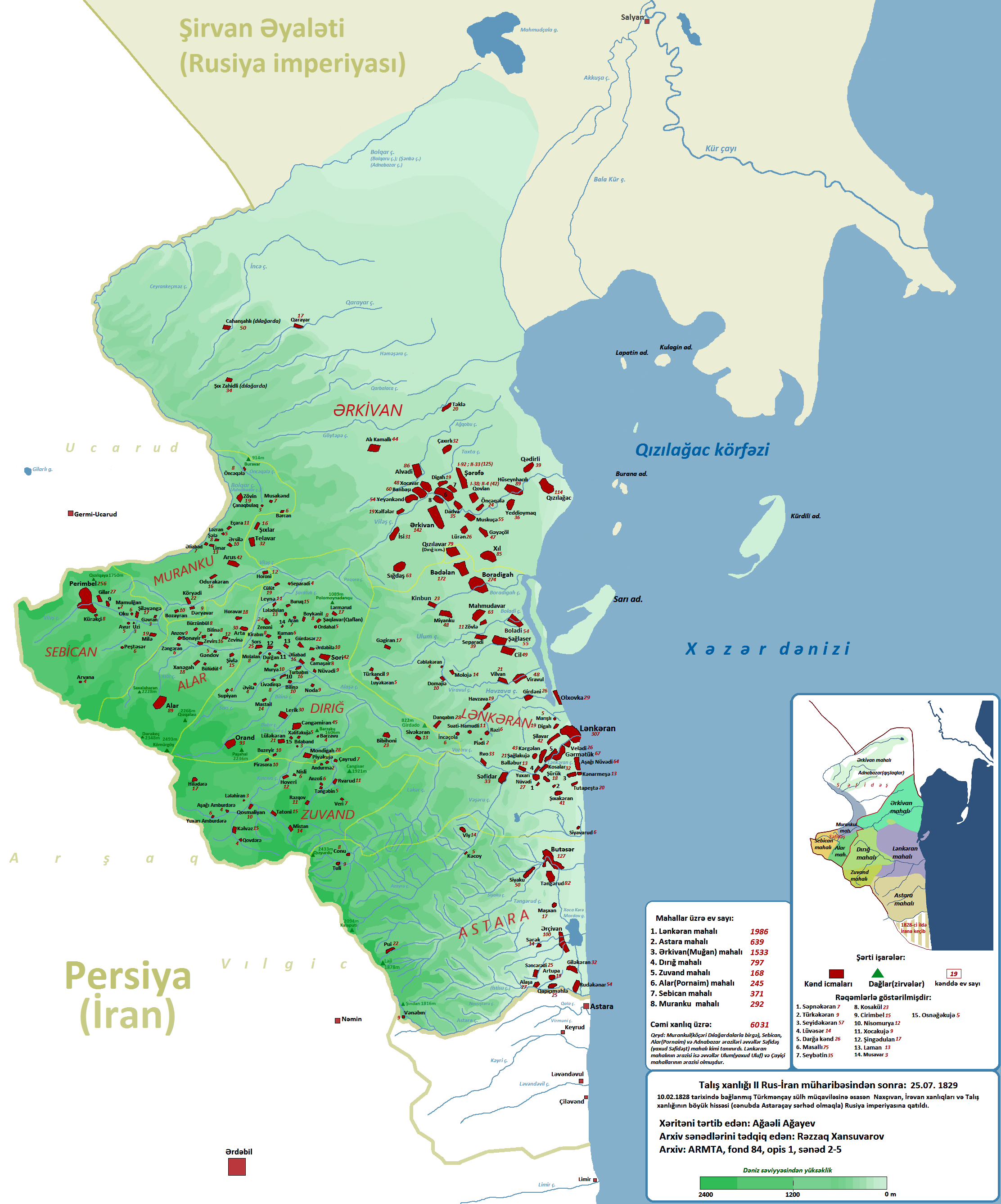 Talış xanlığı 1829-cu ildə. Türkmənçay müqaviləsinin imzalanmasından sonra